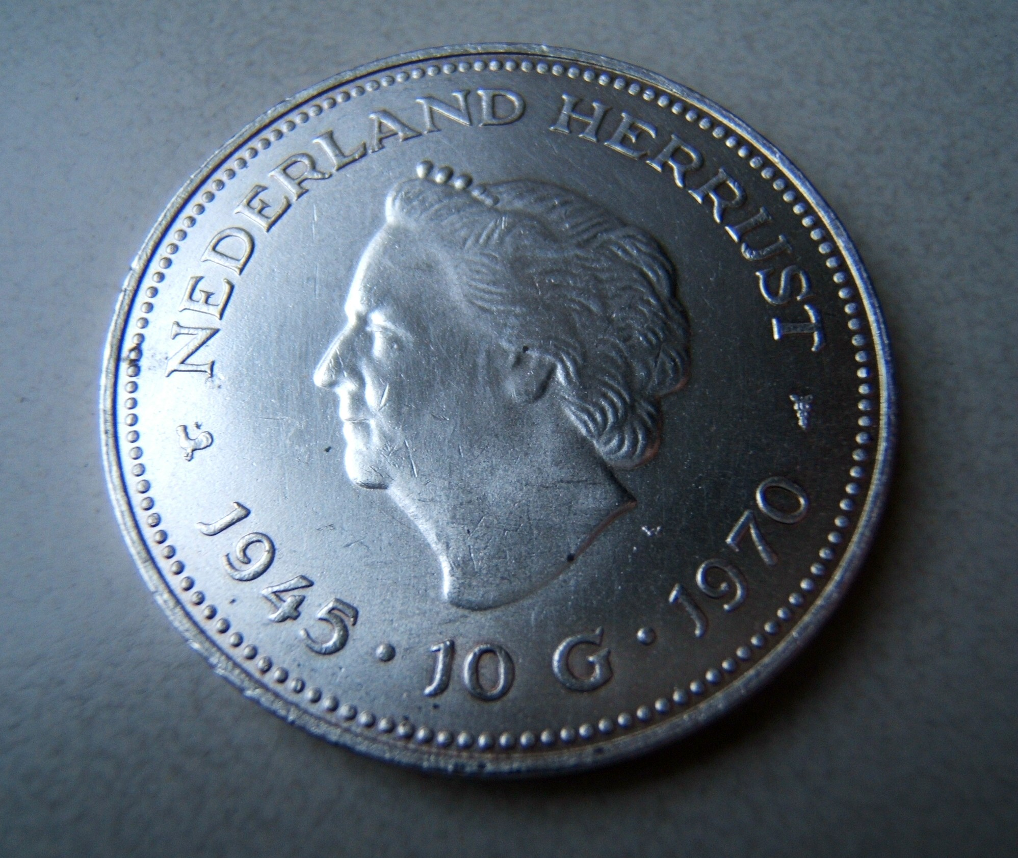 Nederland herrijst 10 gulden, 1970, muntzijde